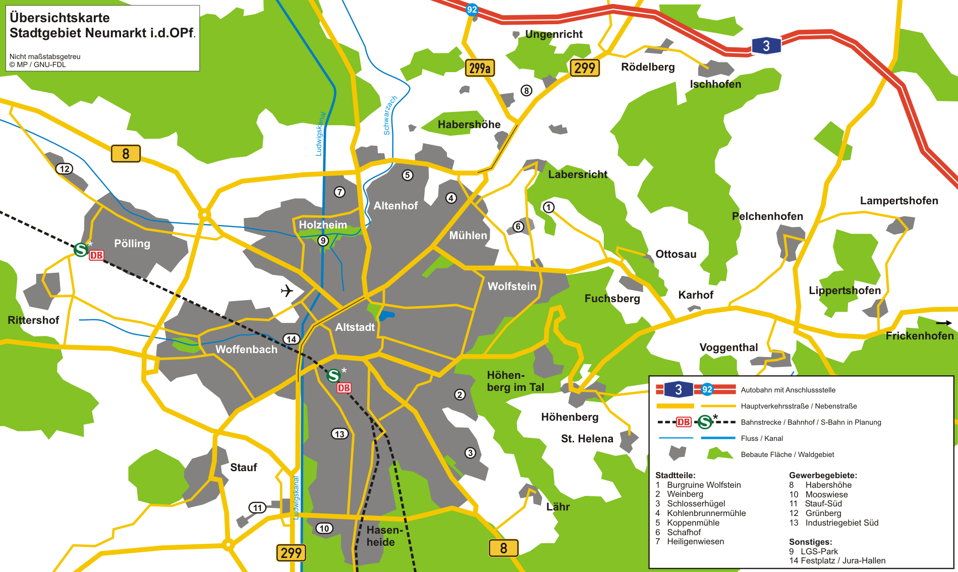 Übersichtskarte Stadt Neumarkt in der Oberpfalz